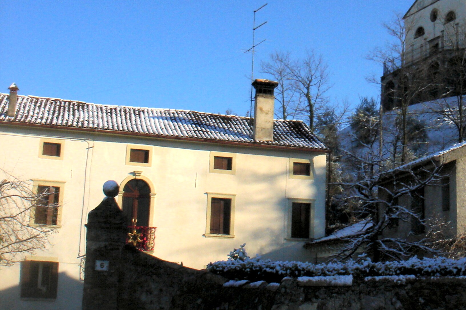 Castello Roganzuolo (San Fior, Treviso, Italia): una delle due ville gemelle del complesso di Villa Sanfiori (XVIII sec.) in Borgo Gradisca.